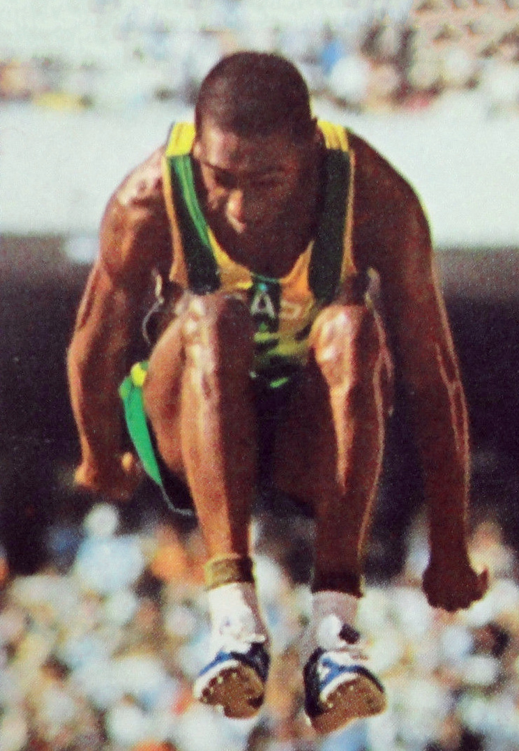 CAMPIONI DELLO SPORT 1969/70-n.61-PRUDENCIO (BRA)-ATLETICA LEGG.